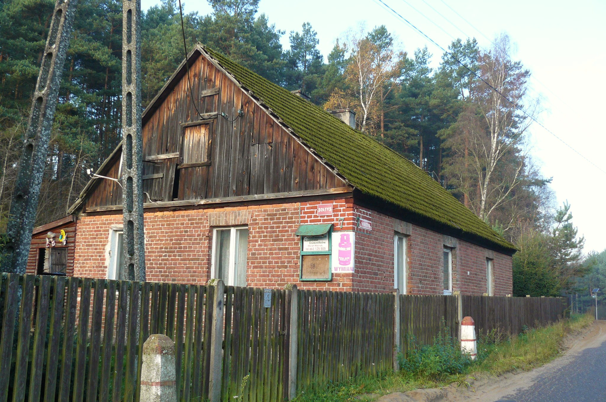 Stara architektura w Sowiej Górze. Puszcza Notecka.